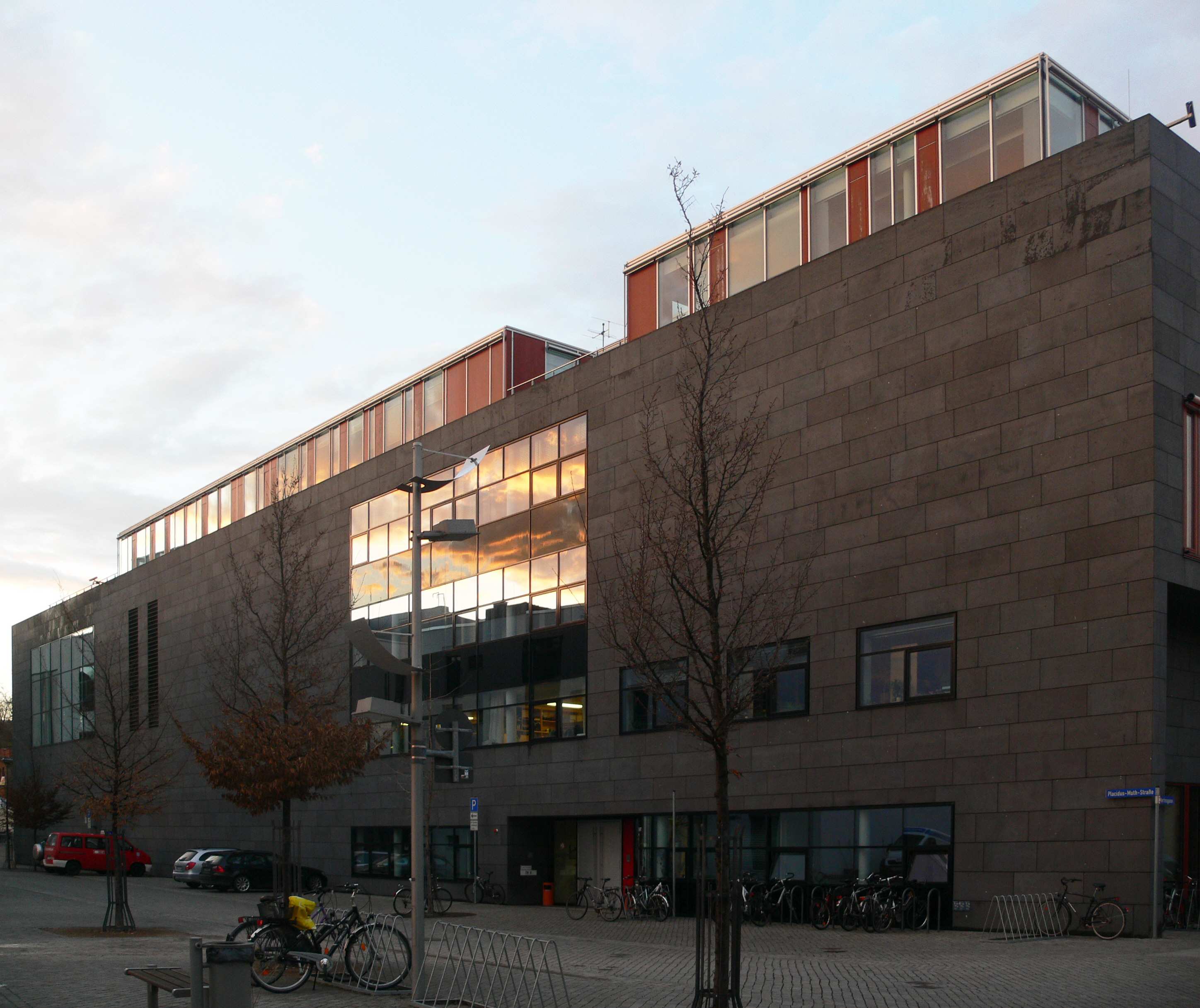 Theater Erfurt - (Süd-West Fassade) - Theaterplatz 1, Erfurt, Thüringen, Deutschland